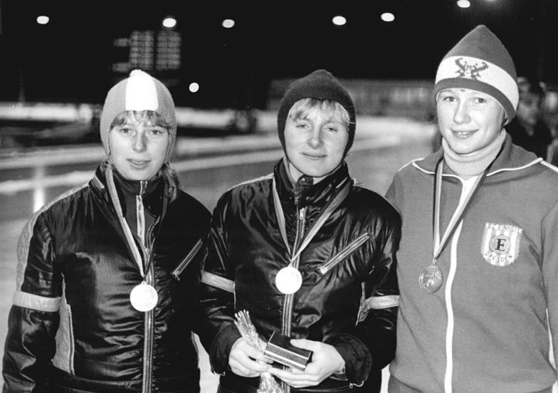 Sabine Becker, Karin Kanis, Sylvia Albrecht ADN-ZB Thieme 12.12.79 Karl-Marx-Stadt: Eisschnellauf- Den ersten von insgesamt neun Meistertitel bei der DDR-Eisschnellaufmeisterschaften auf der Einzelstrecke holte sich auf dem 400-m-Eisoval im Karl-Marx-Städtischen Küchwald Sabine Becker (M..) vom SC Dynamo Berlin über 1500m in der neuen Bahnrekordzeit von 2:12,56 sek. Zweite wurde Karin Kanis (SC Einheit Dresden-re.) vor Titelverteidigerin Sylvia Albrecht (SC Dynamo Berlin).